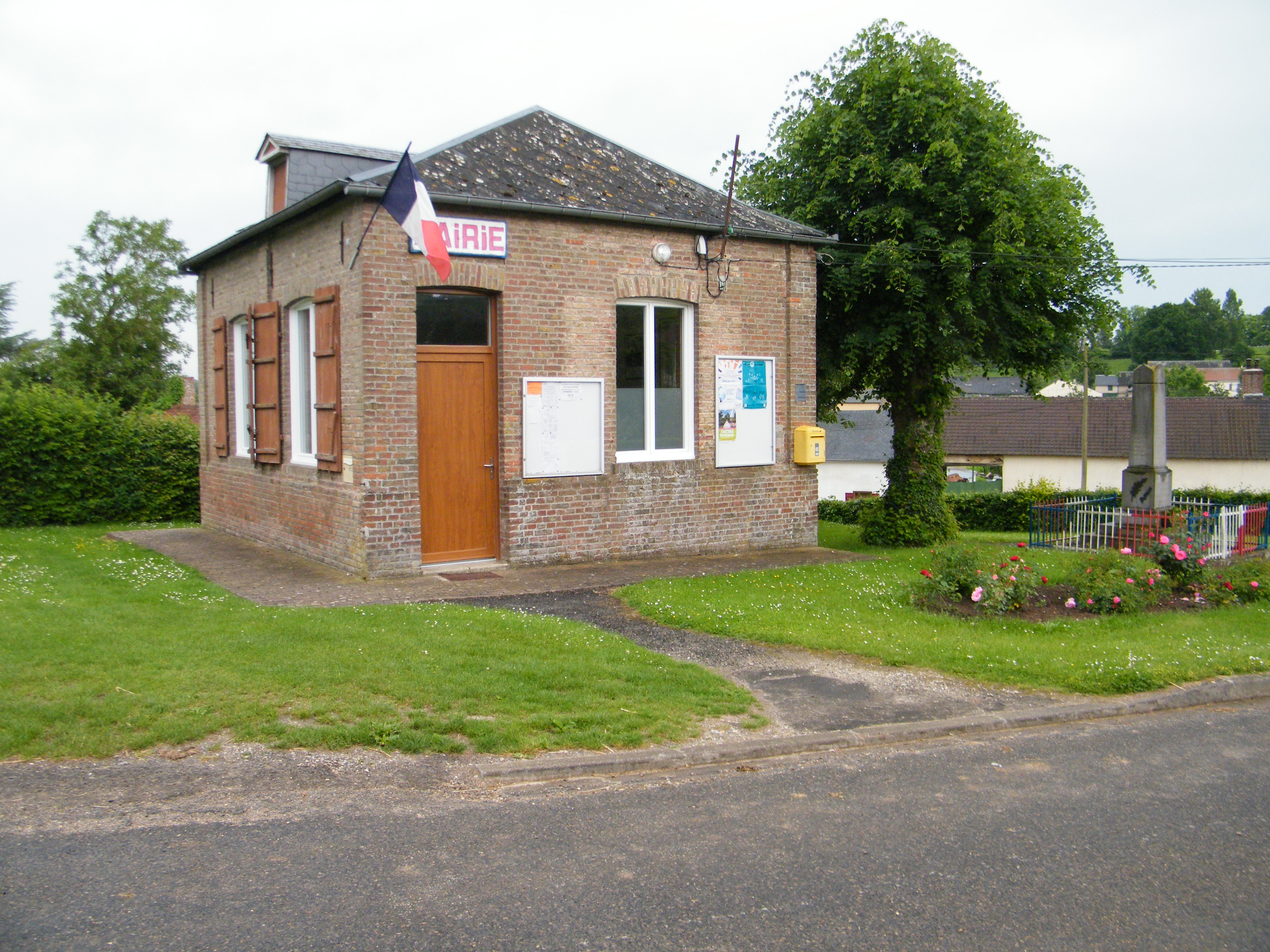 Mairie